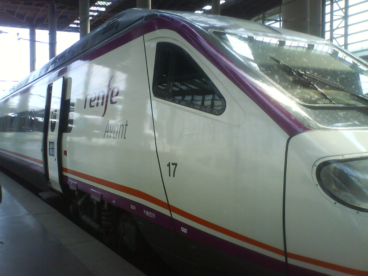 Renfe Avant en la estación de Madrid-Atocha